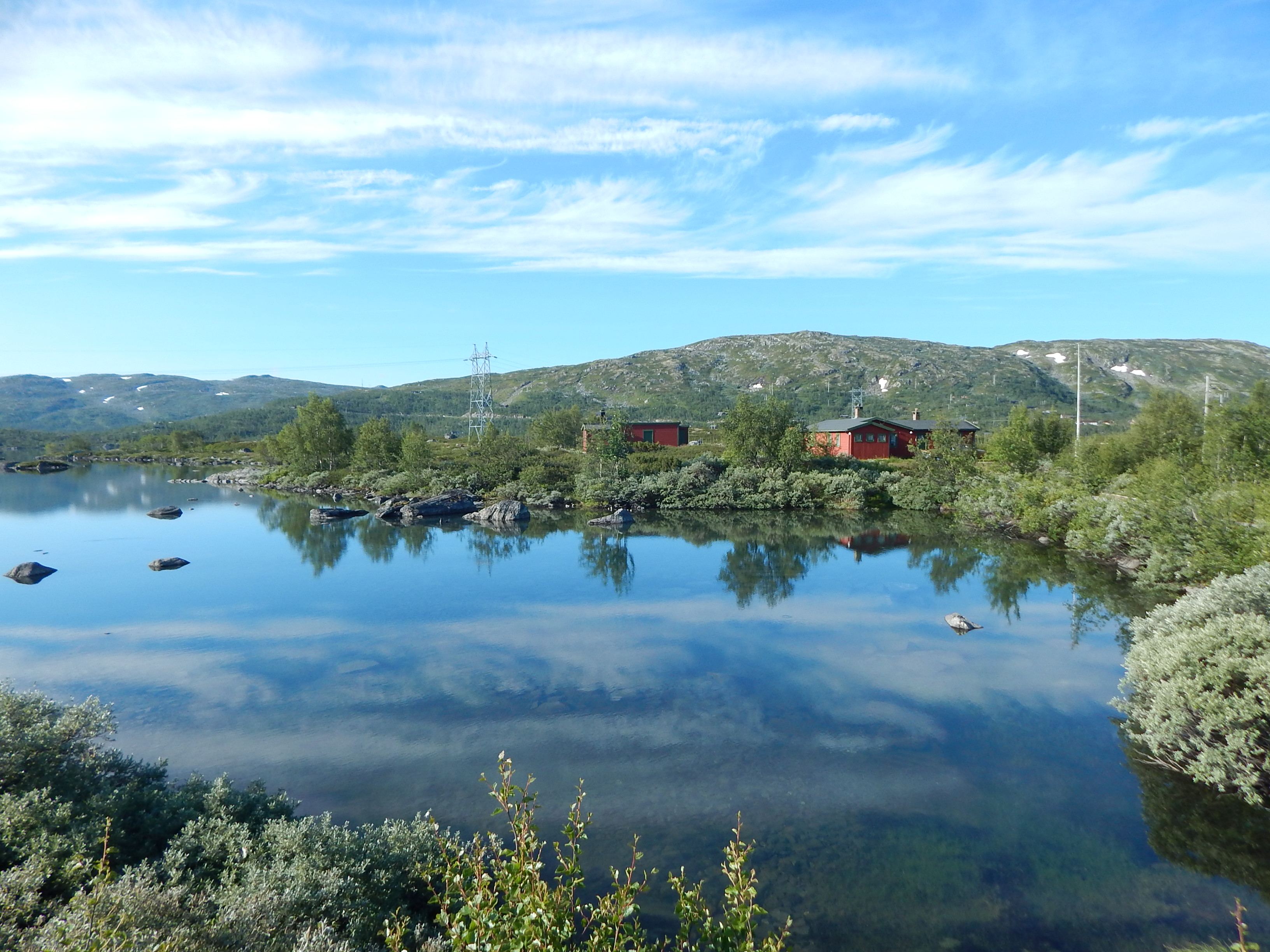 Sløddfjorden ved Haugastøl